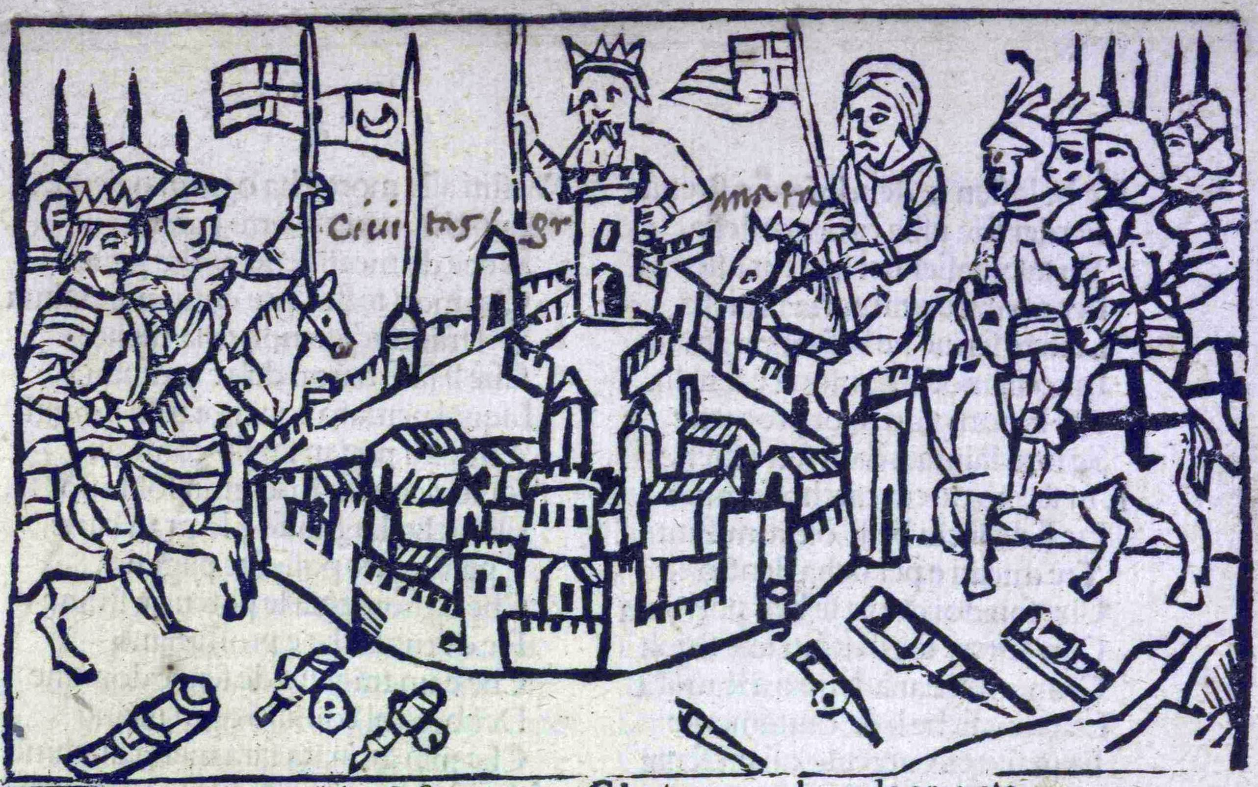 carta pi greco1r